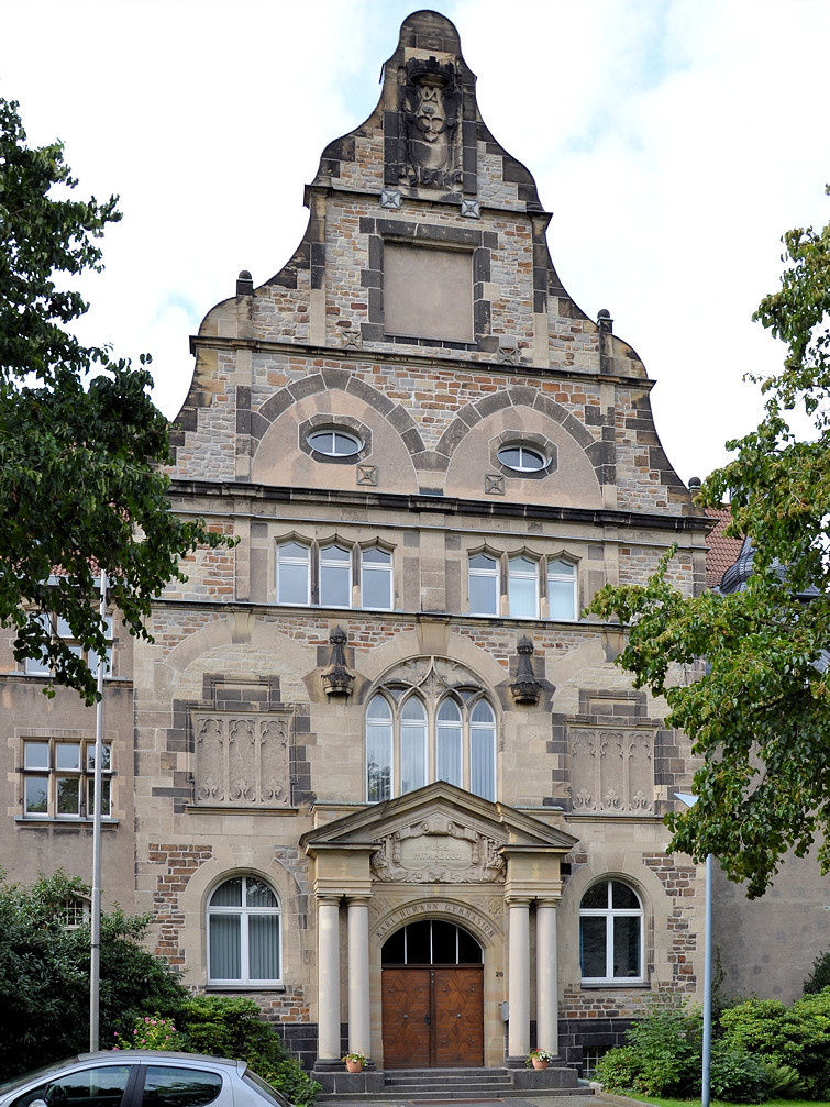 Hauptportal des Carl-Humann-Gymnasiums in Essen-Steele